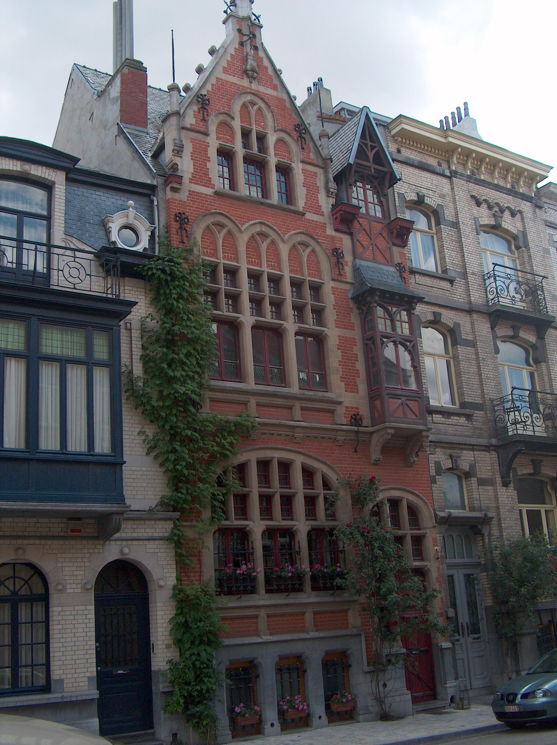 Maison de et conçue par Edmond Serneels à Etterbeek, Bruxelles, Belgique.